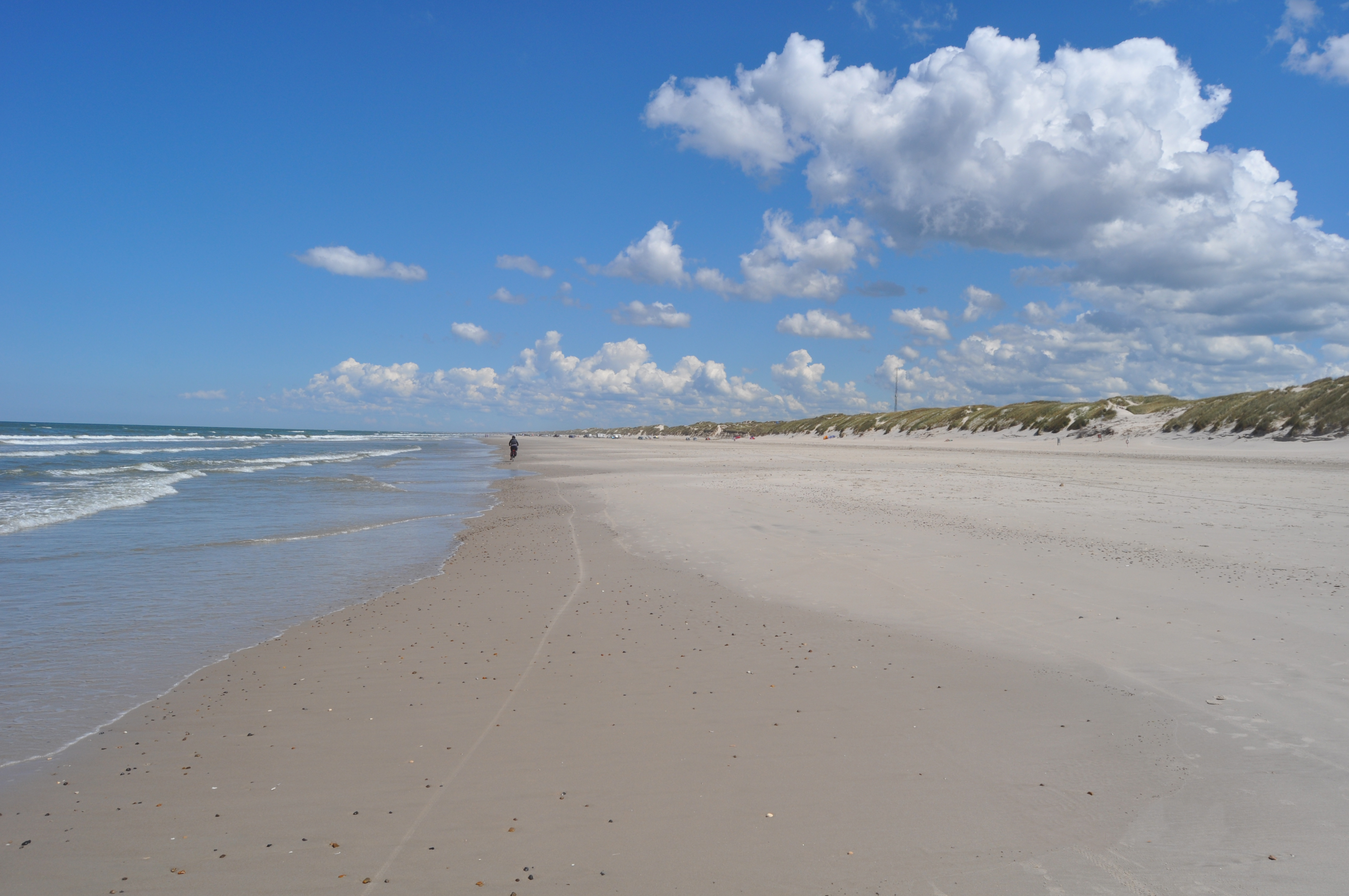 Strand und Weißdünenwall nördlich von Vejers